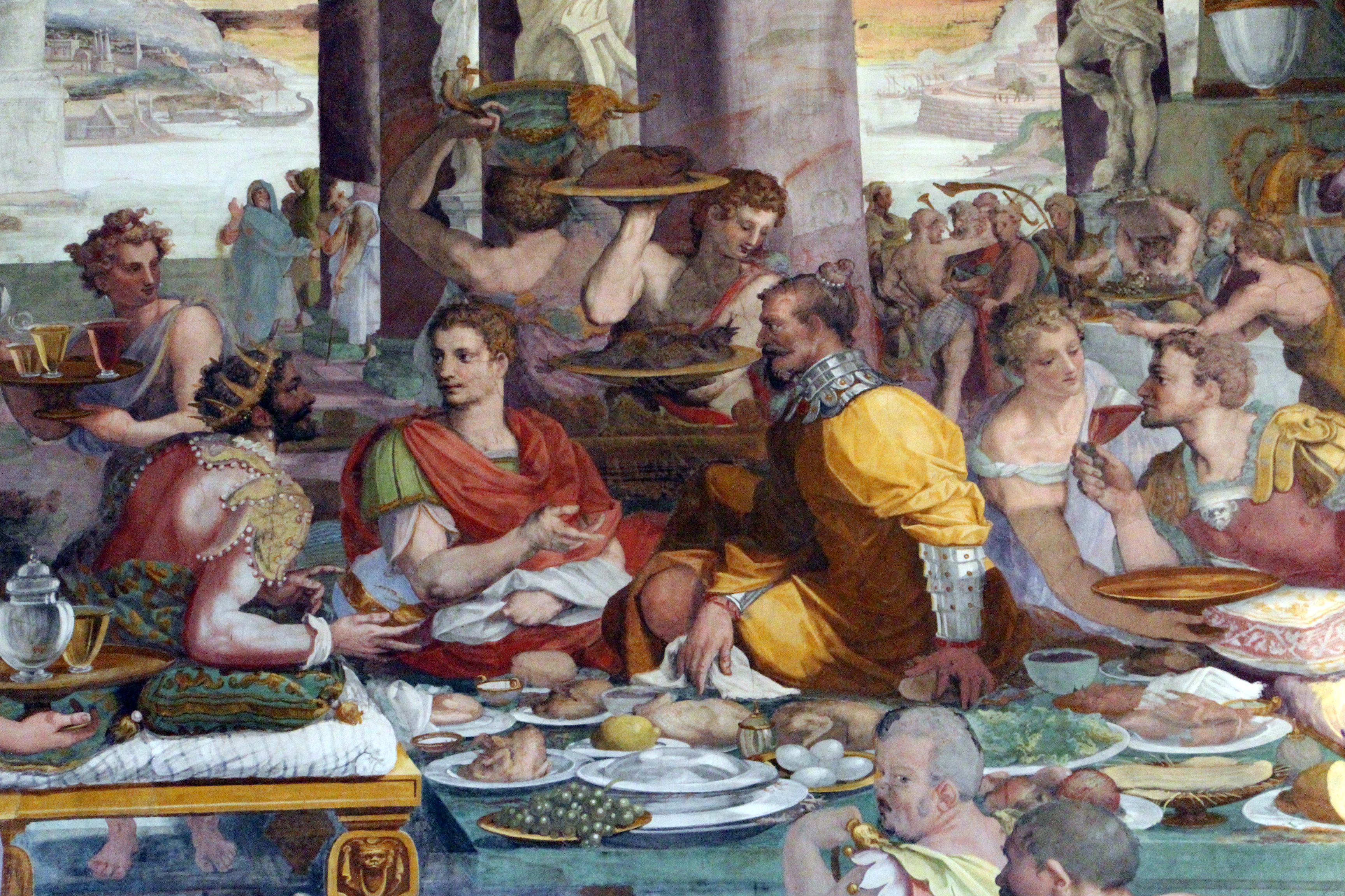 Villa medicea di Poggio a Caiano - MIBAC The making of this document was supported by Wikimedia CH. (Submit your project!) For all the files concerned, please see the category Supported by Wikimedia CH. This is a photo of a monument which is part of cultural heritage of Italy.